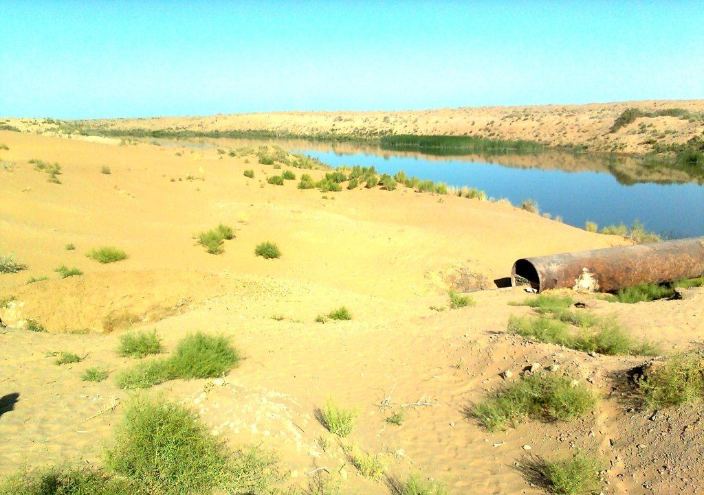 Пустыня у границы Хорезма и Туркменистана. Видна закан сув (ирригационно-дренажная система)